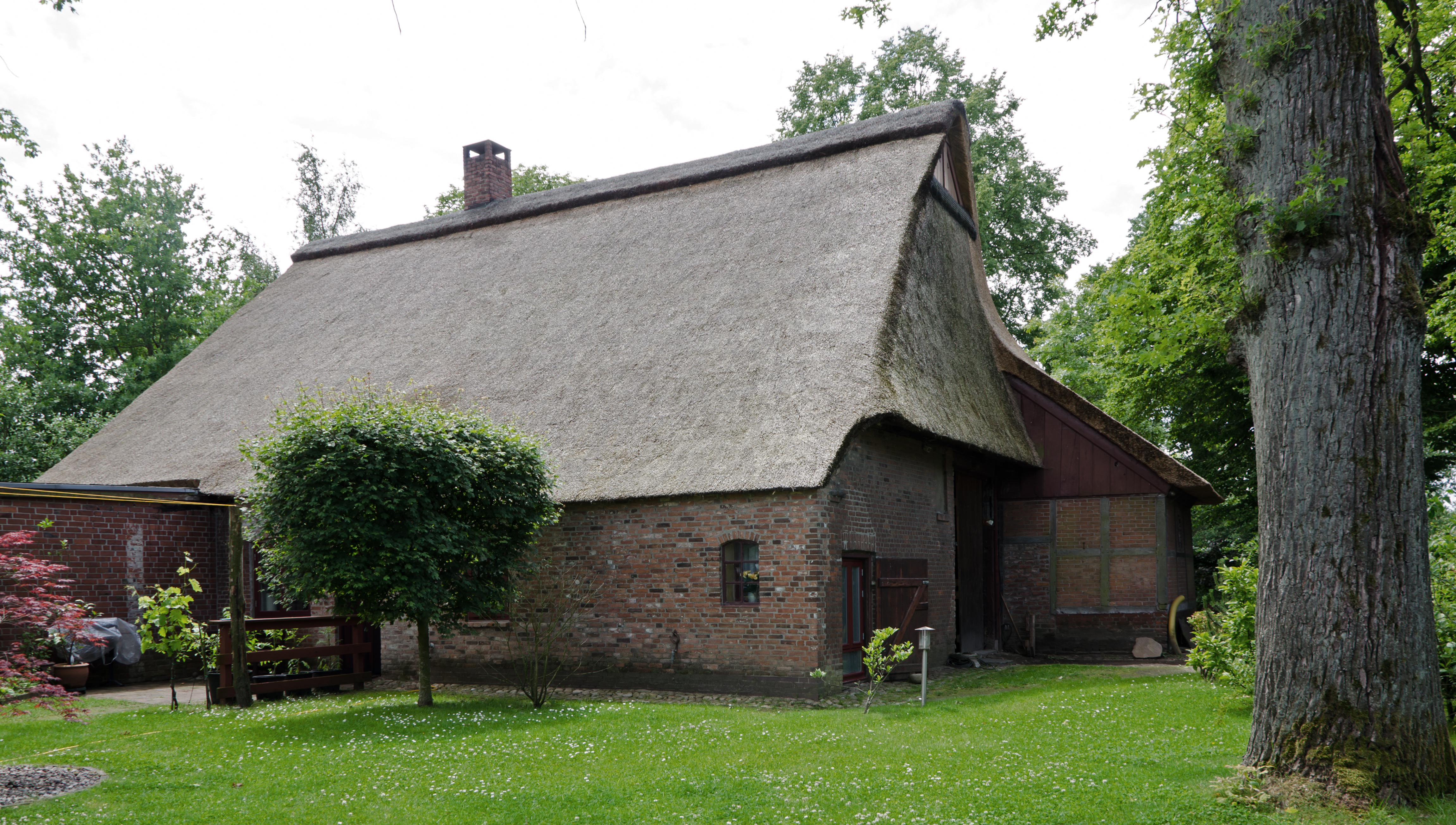 Kummerfeld Dorfstr. 96